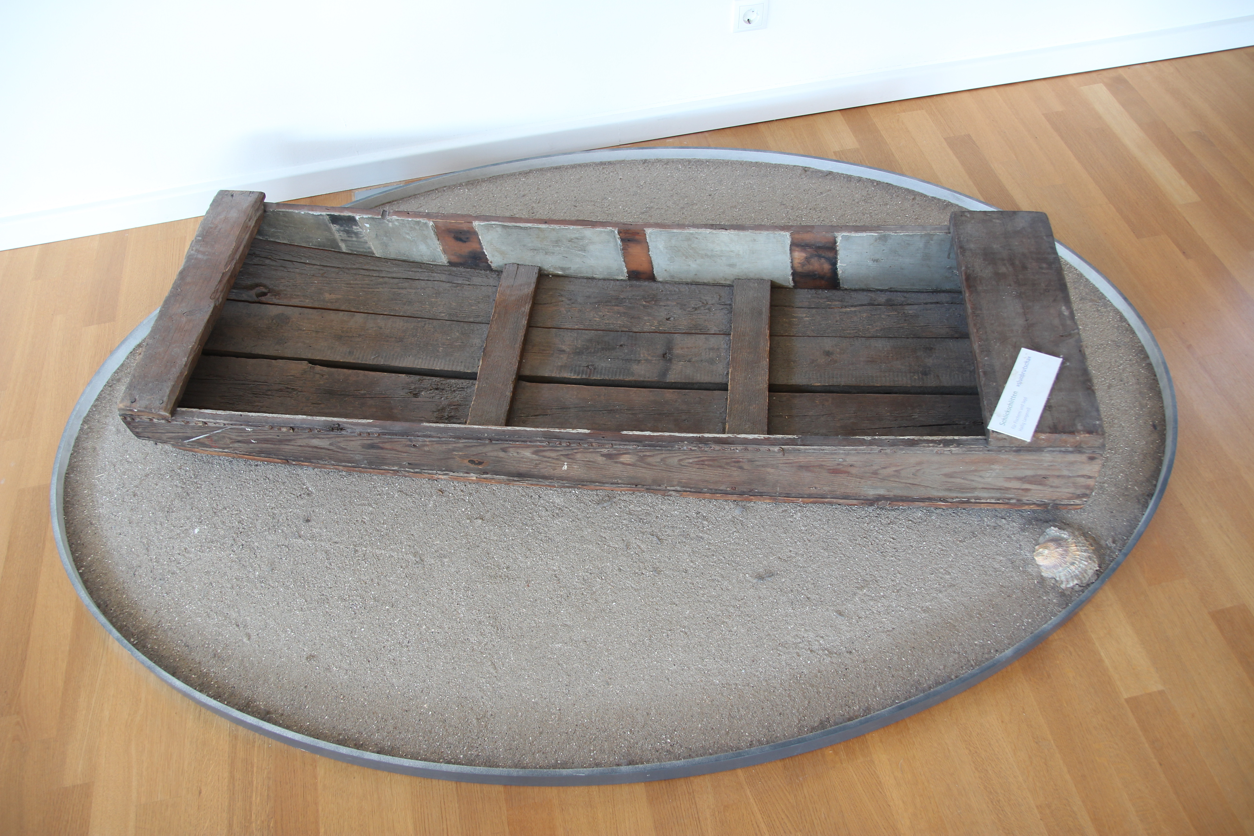 NordseeMuseum Husum (Nissen-Haus). Schlickschlitten.